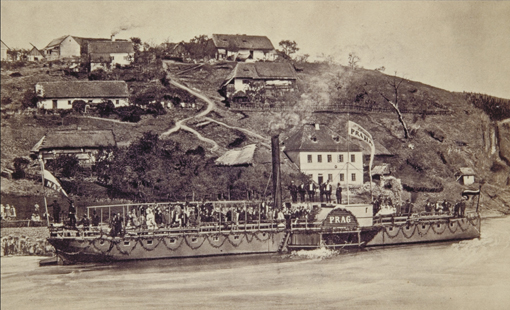 Štěchovice, kolesový parník Praha (Prag)